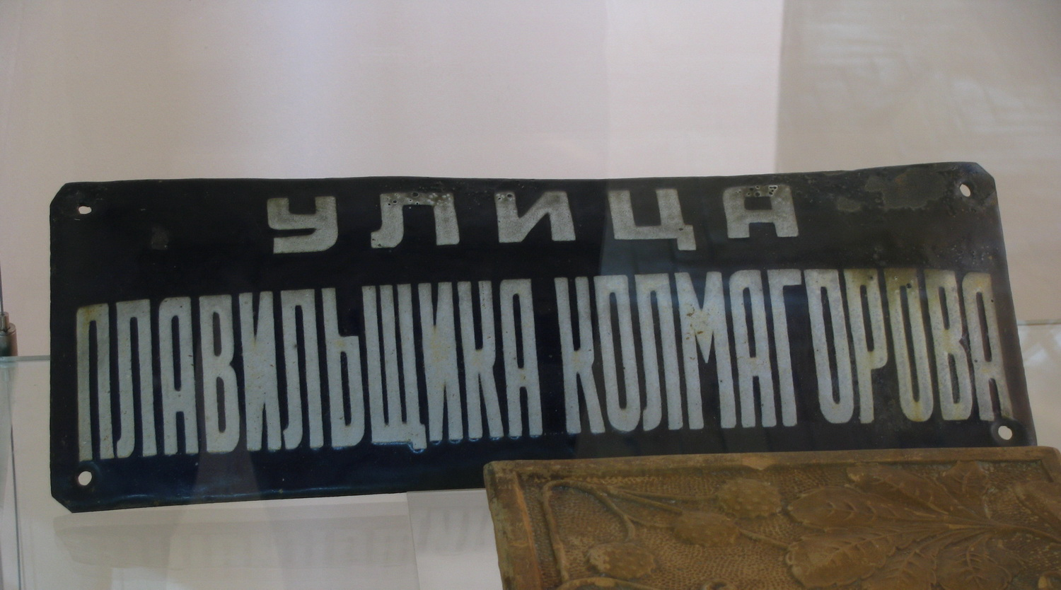 Табличка, располагавшаяся на одном из зданий по ул. Колмогорова в Екатеринбурге. Из коллекции Свердловского областного краеведческого музея (УОЛЕ)